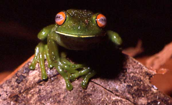 Aplastodiscus albosignatus